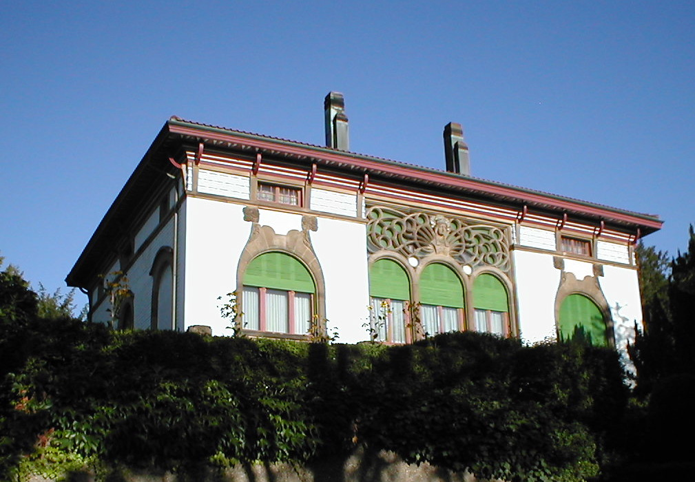 Villa Schliz in Heilbronn, Jugendstilbau von 1901